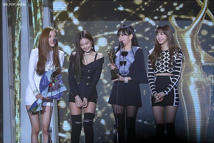 서울가요대상 - 블랙핑크